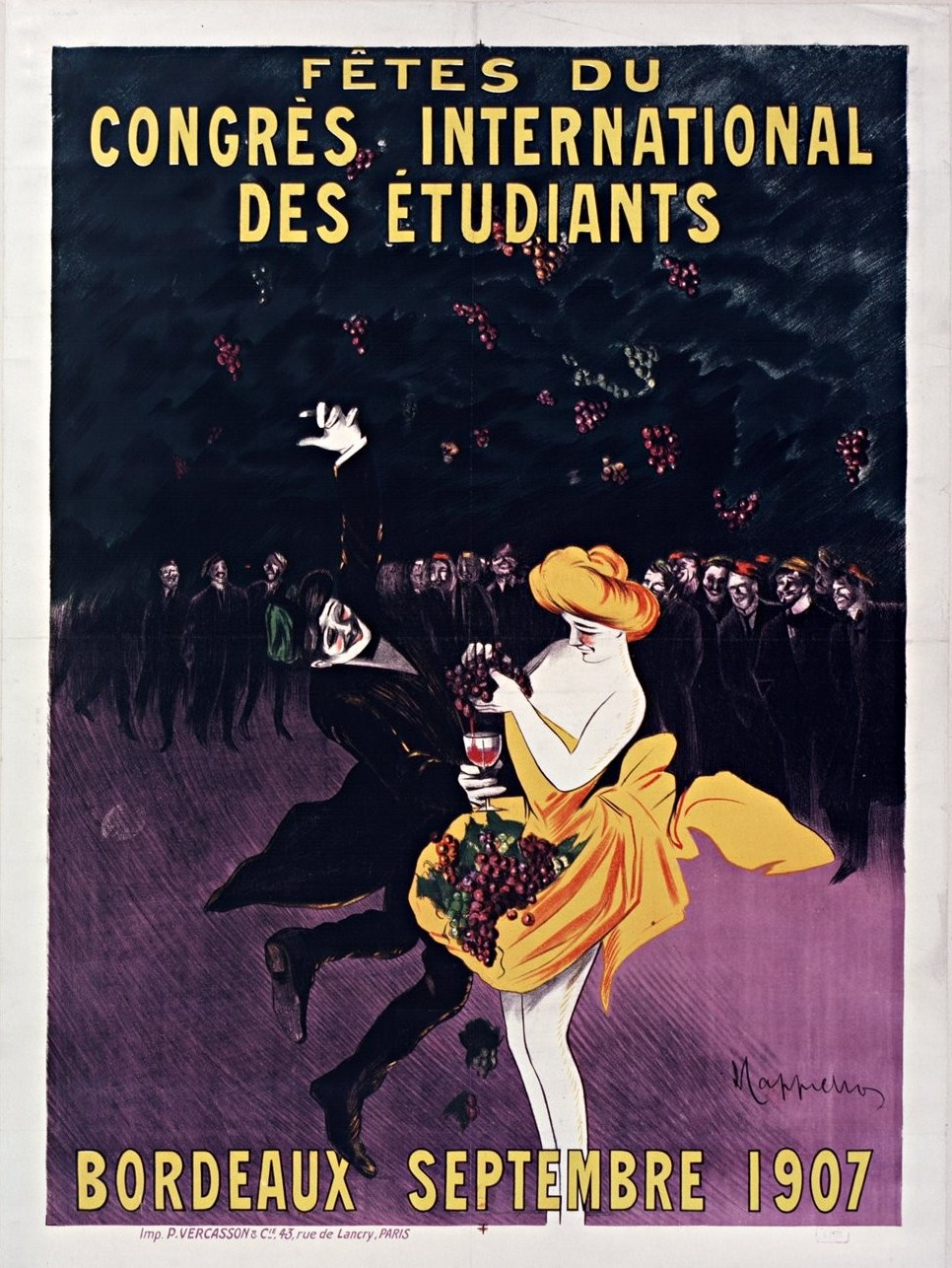 Affiche pour les fêtes du 5ème congrès de la Corda Fratres tenu à Bordeaux en 1907. On distingue des faluches dans le fond sur deux étudiants et aussi une sur la tête du danseur au premier plan.